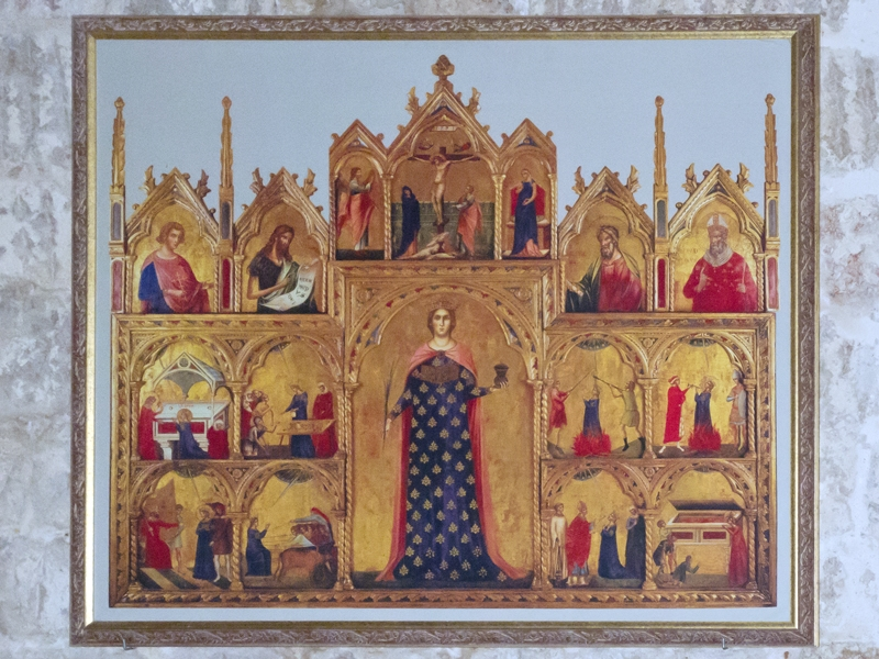 Crkva sv. Lucije u Jurandvoru